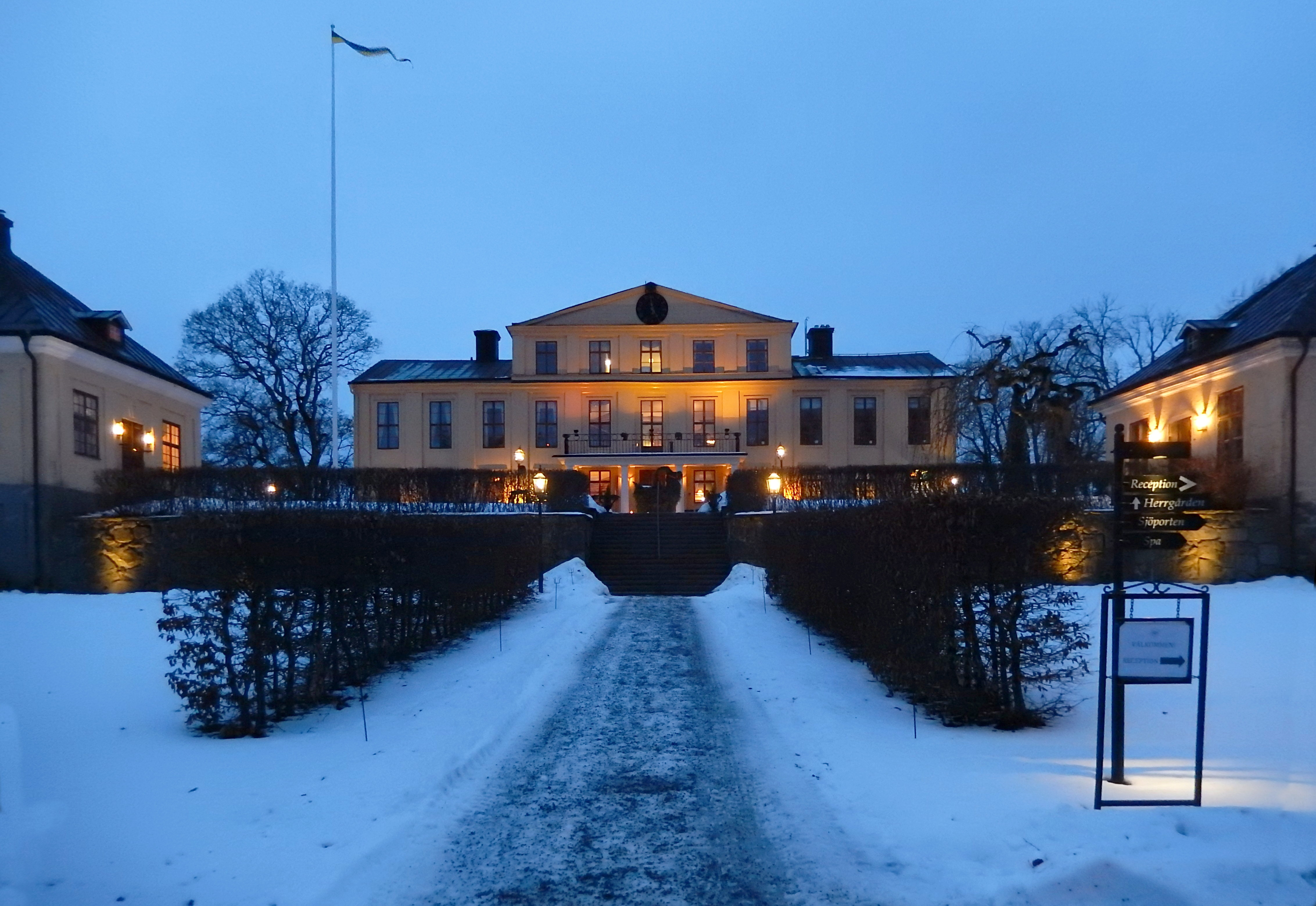 Krusenberg herrgård (Krusenberg 1:58, 1:1 och ga:1)